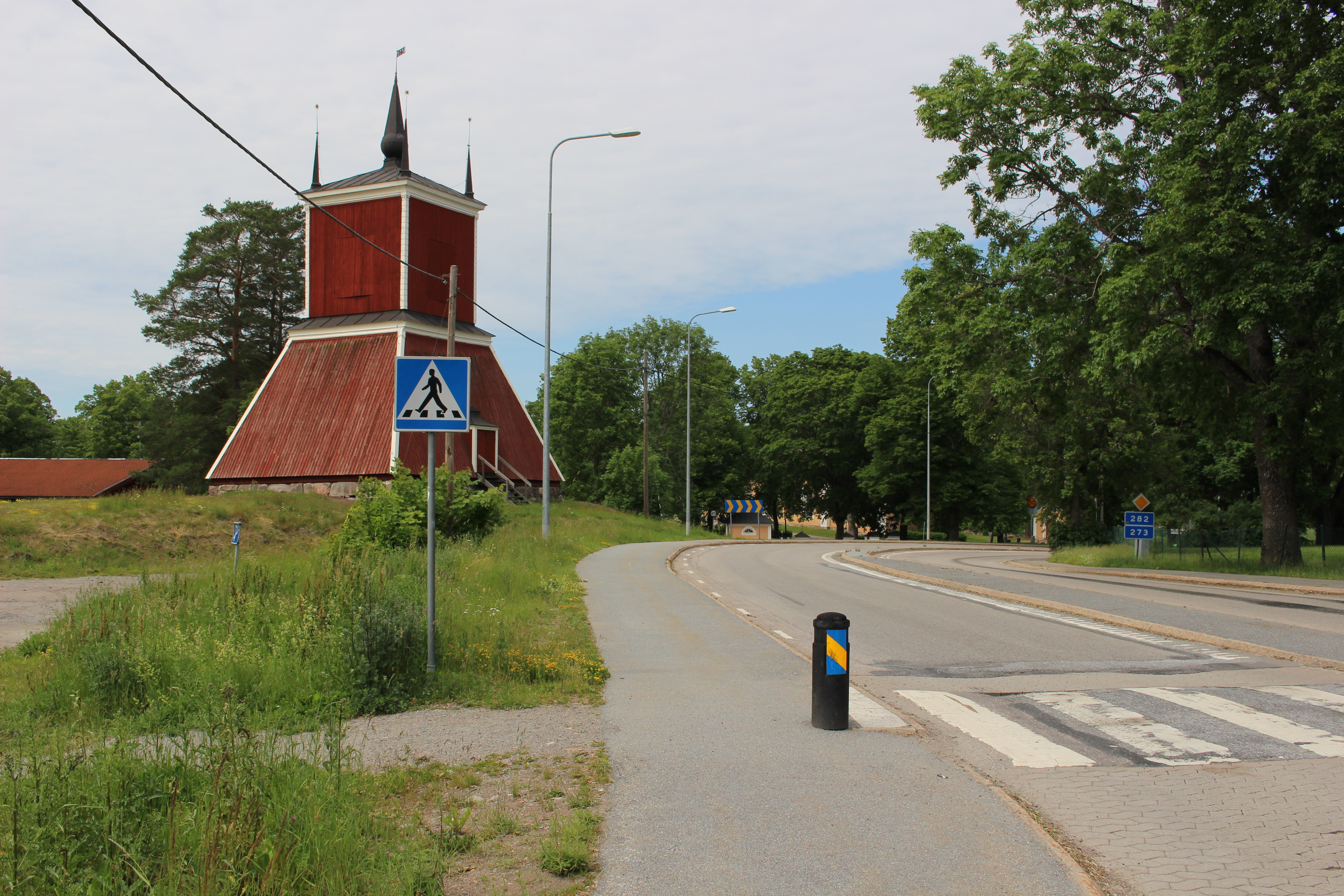 Länsvägarna 273 och 282 delar väg i Almunge kyrkby.